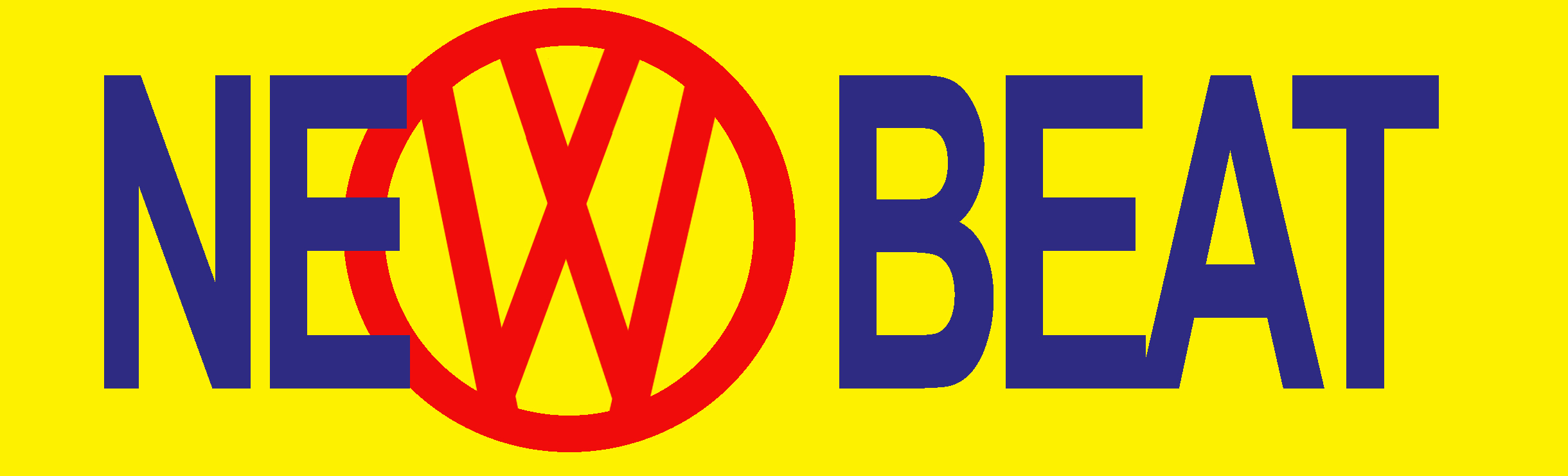 Logo de la musique new beat d'après le magazine Fabiola. Le W emprunte le logo d'une marque automobile.